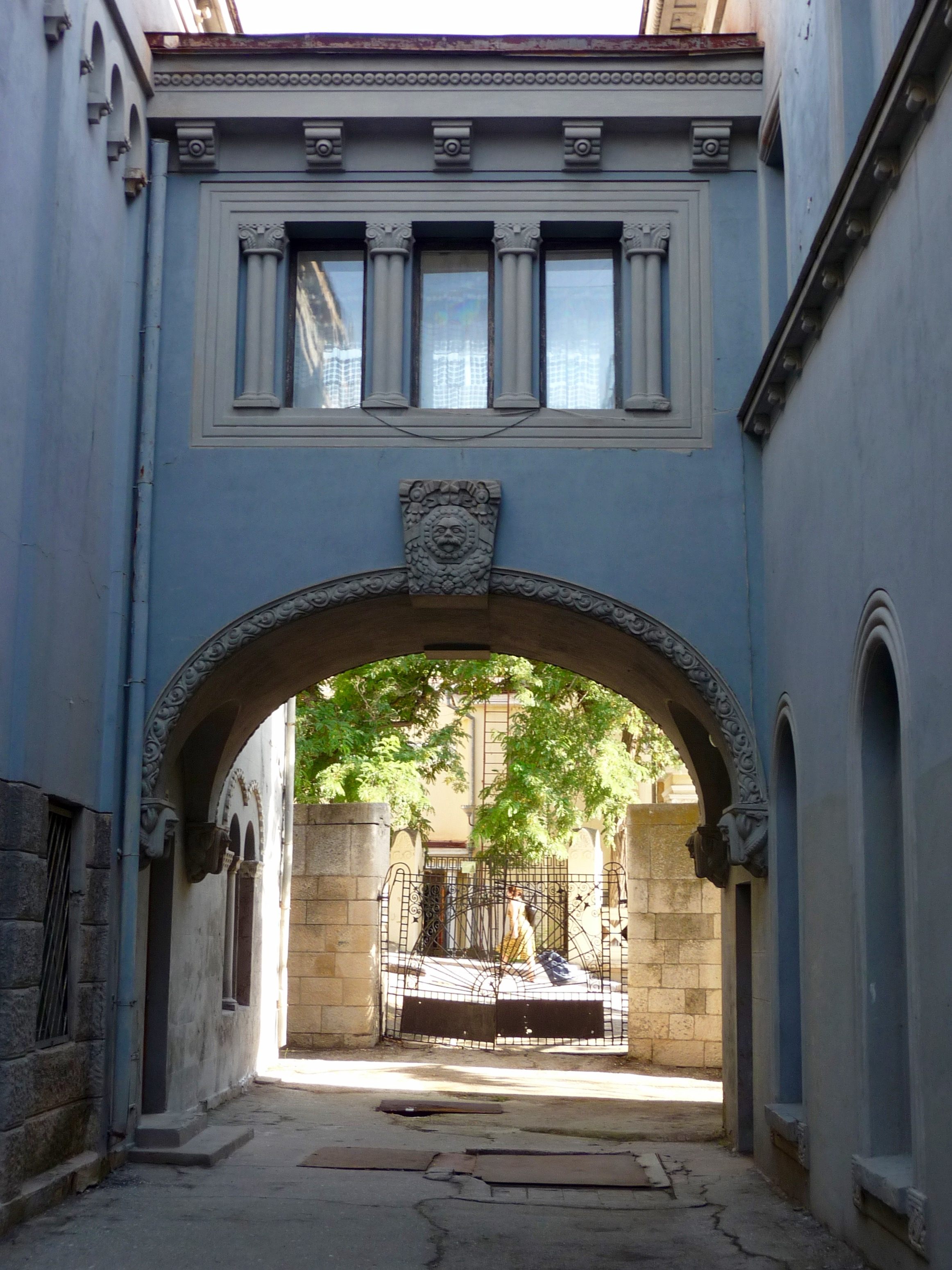 Огорожа і малі форми, Феодосія, пр-т Айвазовського, 31